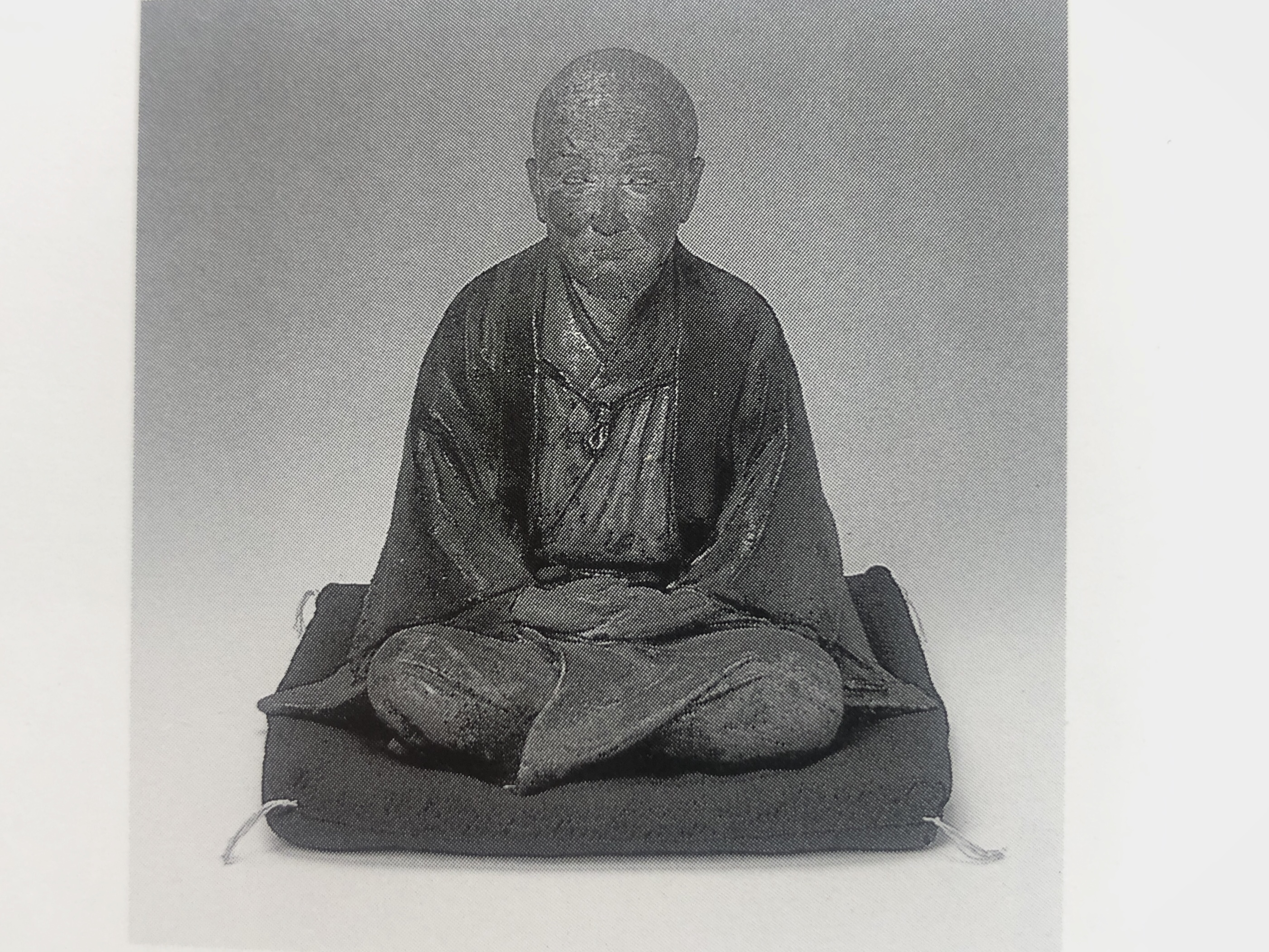 志野流家元15代目 蜂谷閑斎宗意